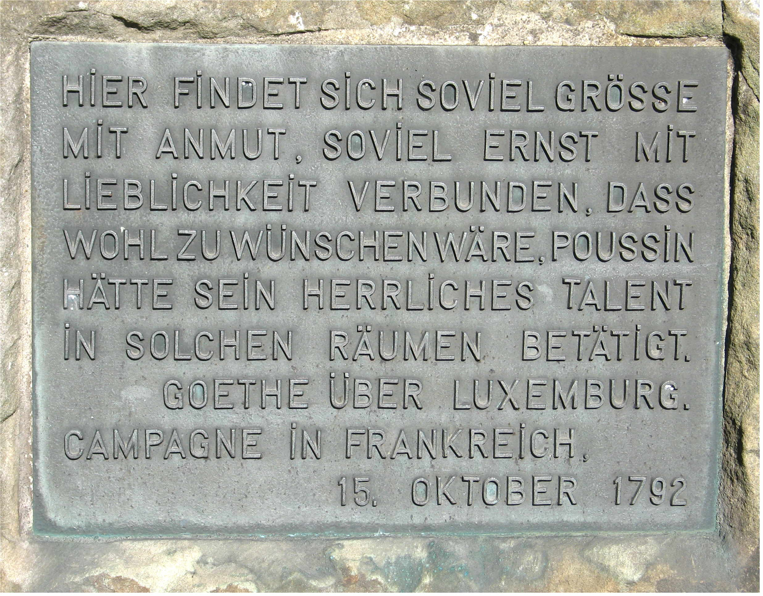 Text op dem Gedenksteen um Fëschmaart als Erënnerung un dem Goethe säi Besuch zu Lëtzebuerg